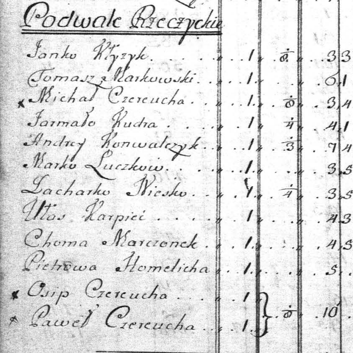 Рэчыцкае падвалле. Гістарычны раён Гомеля. Фрагмент "Інвентара" 1771 г.